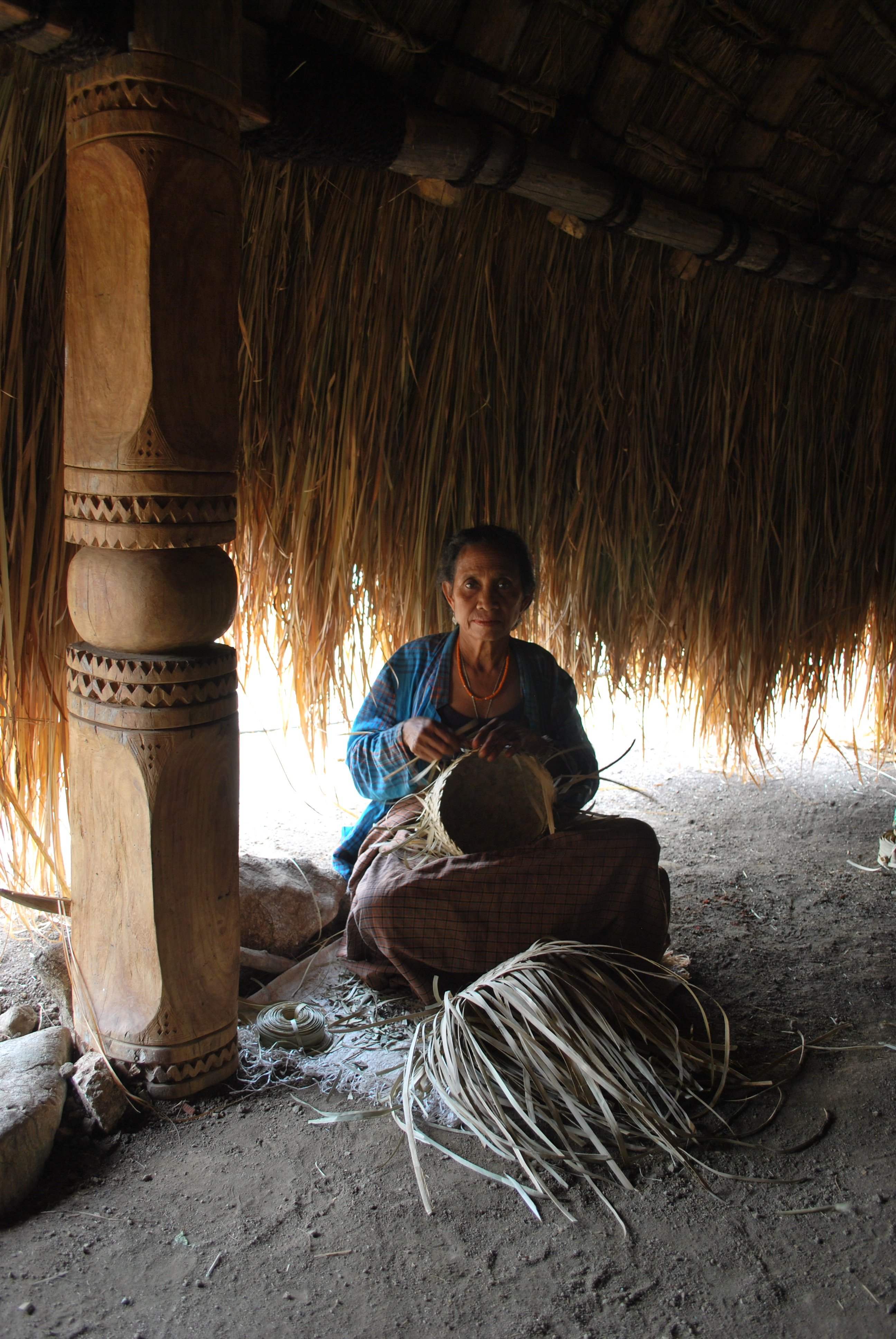 Frau beim flechten in Fatuc Laran, Lactos, Cova Lima, Osttimor